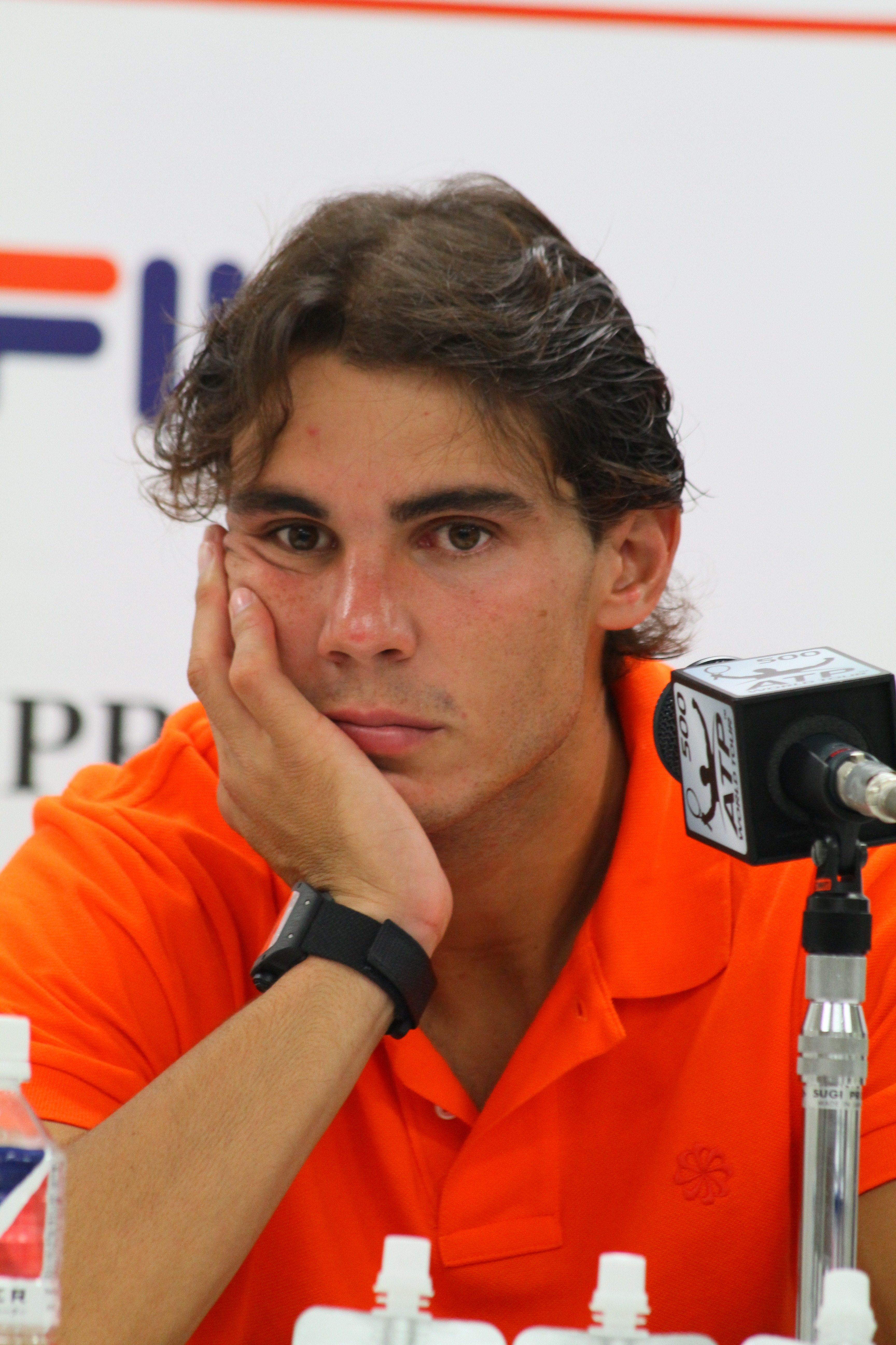 Rafael Nadal, en el torneo ATP de Tokio 2010.